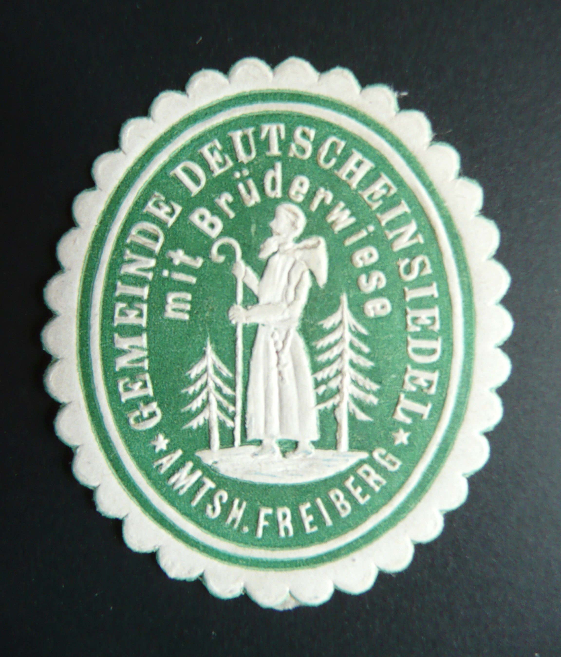 Siegelmarke der Gemeinde Deutscheinsiedel mit Büderwiese